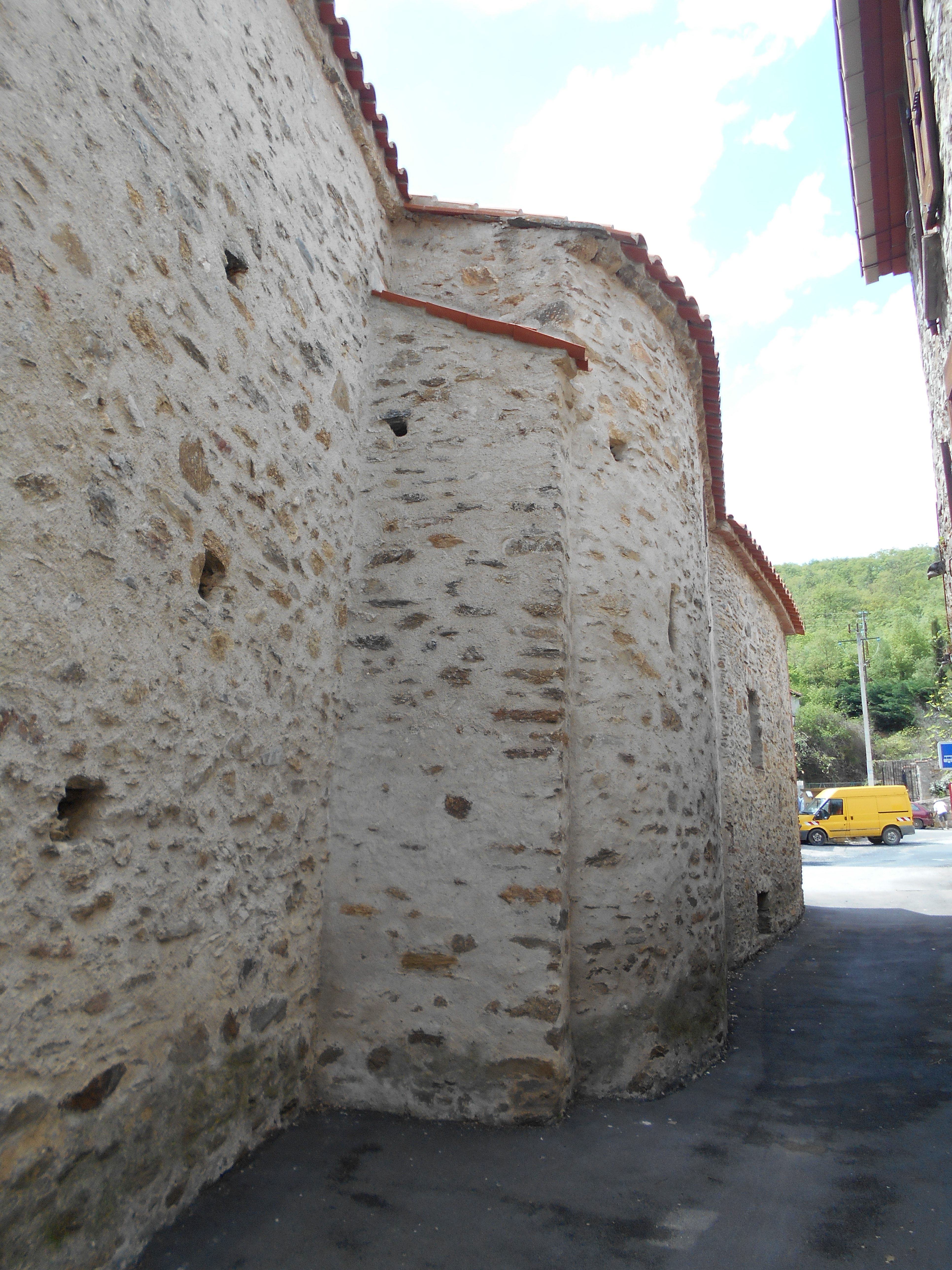 Sant Marrtí de Clarà (Clarà i Villerac)